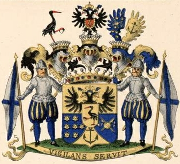 Lütke suguvõsa krahvivapp